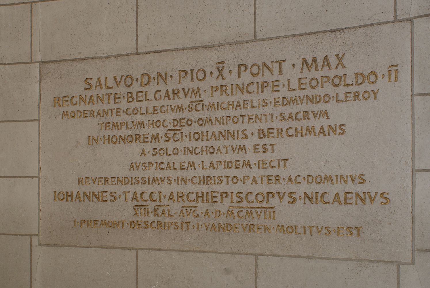 Sint-Jan-Berchmanskerk - Gedenksteen - EERSTESTEENLEGGING door aartsbisschop Tacci op 13 augustus 1908